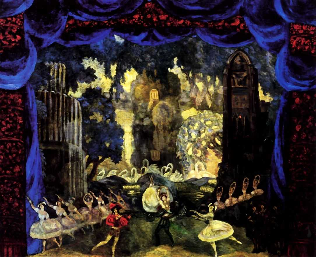 Судейкин Сергей Юрьевич. Парк перед замком. Эскиз декорации к «Лебединому озеру» Чайковского. 1911